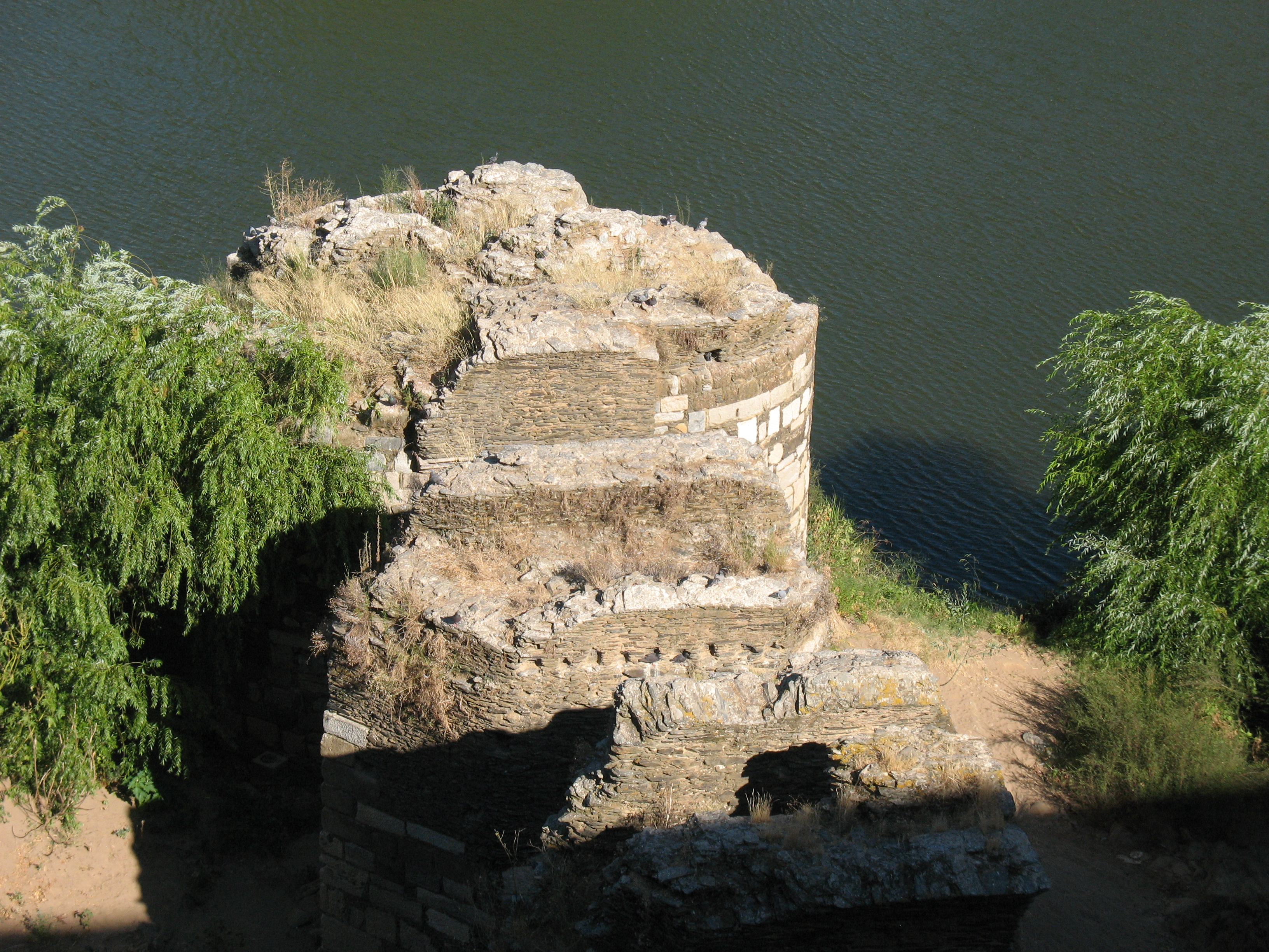 Ruine unterhalb von Mértola im Süden Portugals